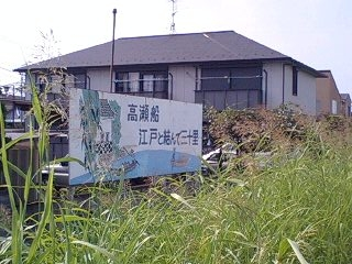 埼玉県川越市上新河岸